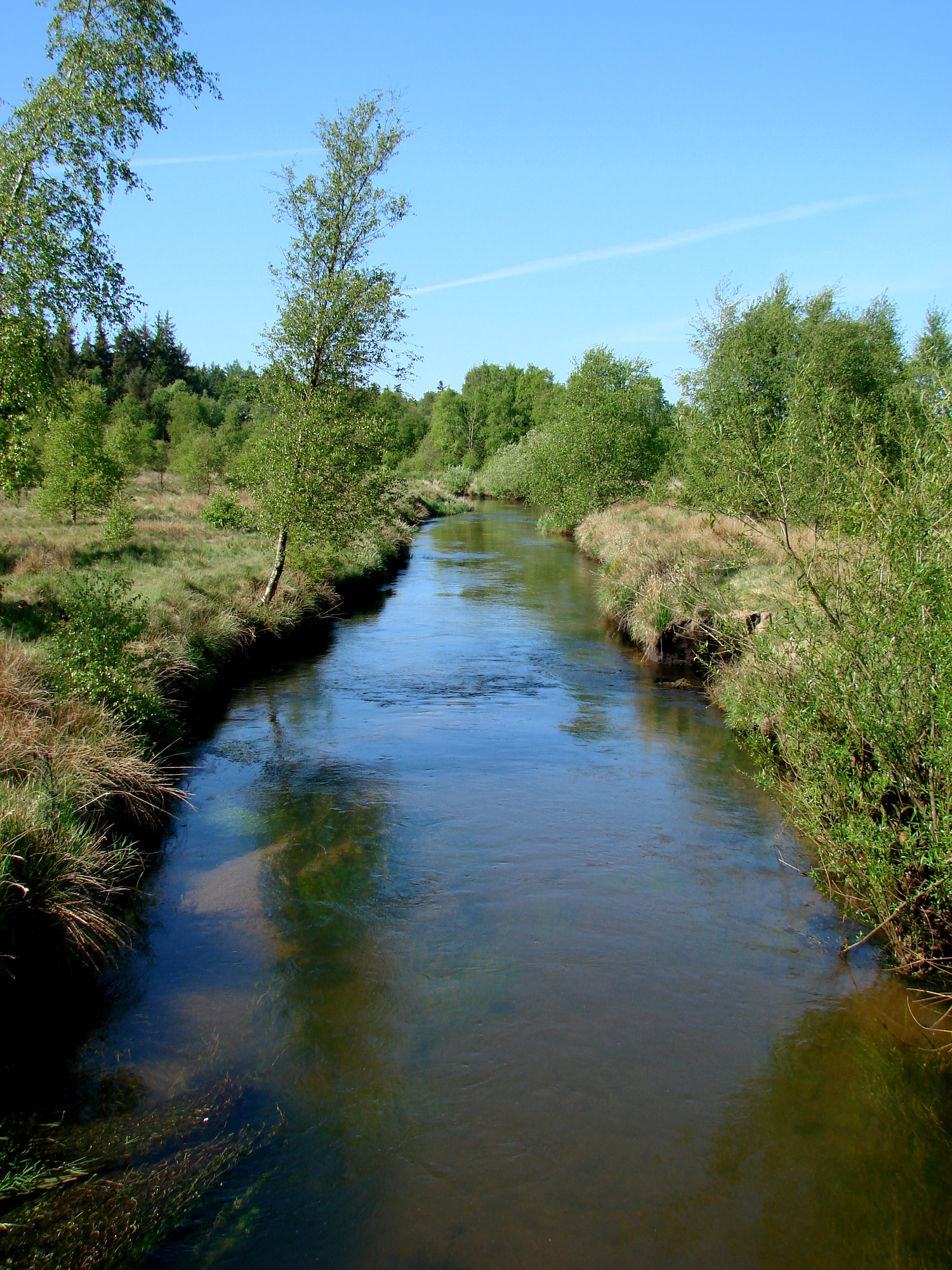 Grindsted å opstrøms byen